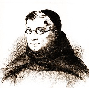 Padre Davide da Zanica